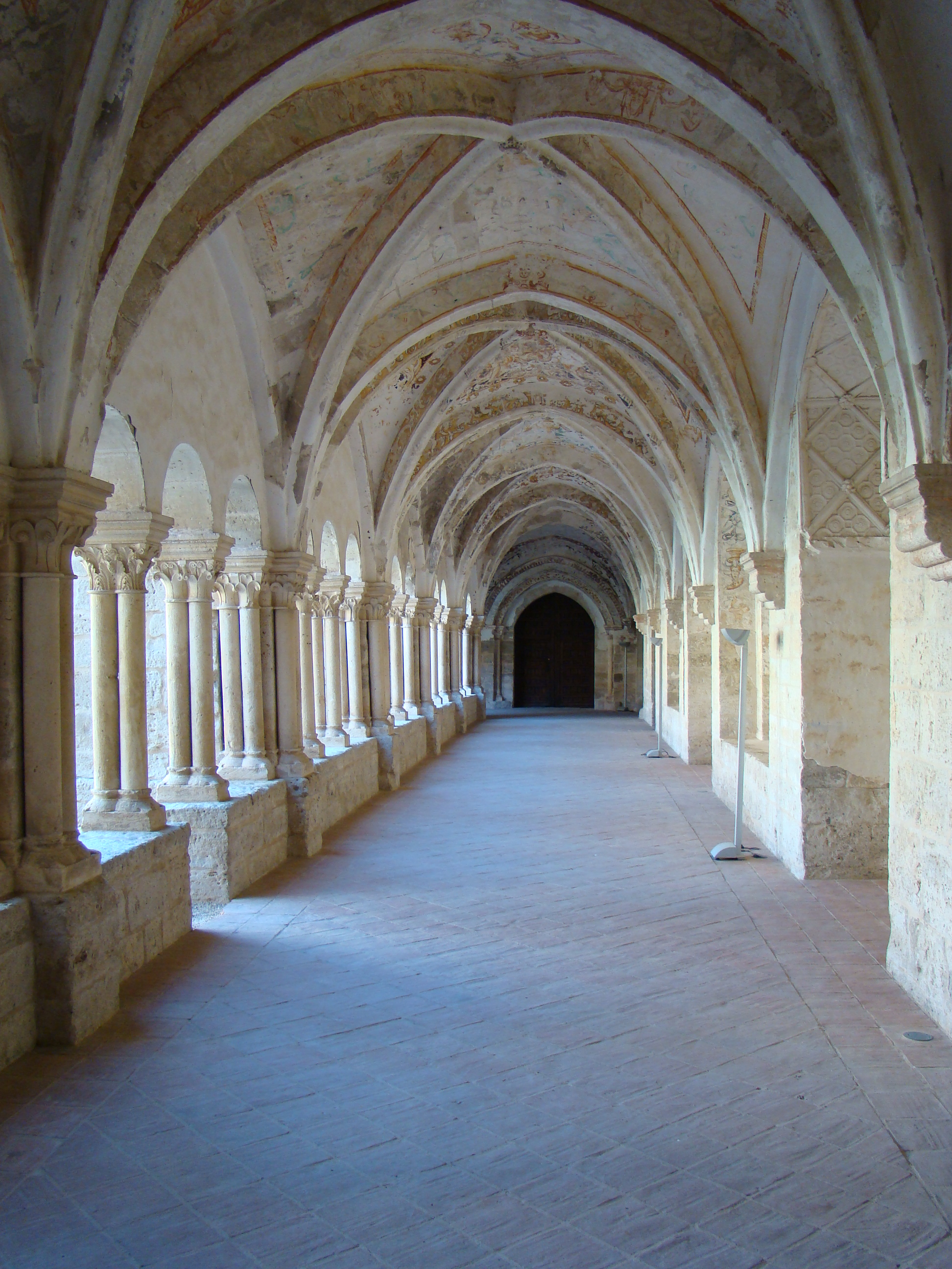 Valbuena de Duero, Valladolid, España. Claustro del monasterio de Santa María de Valbuena. Panda de la sala capitular. Al fondo la «puerta de monjes».